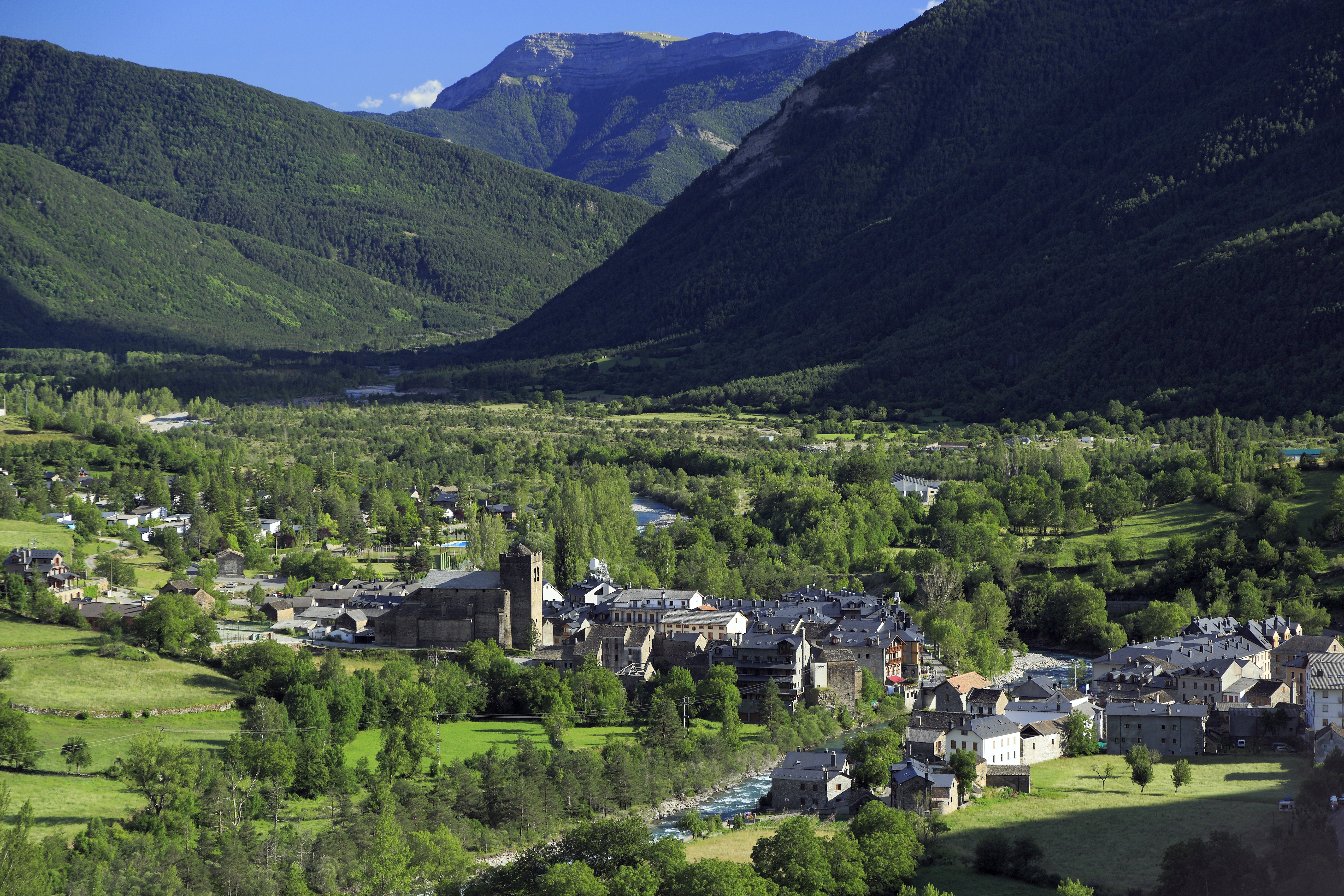 Im Talgrund des Valle de Broto, von der Straße nach Torla